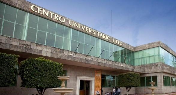 Plantel Olímpica UTEG, Guadalajara